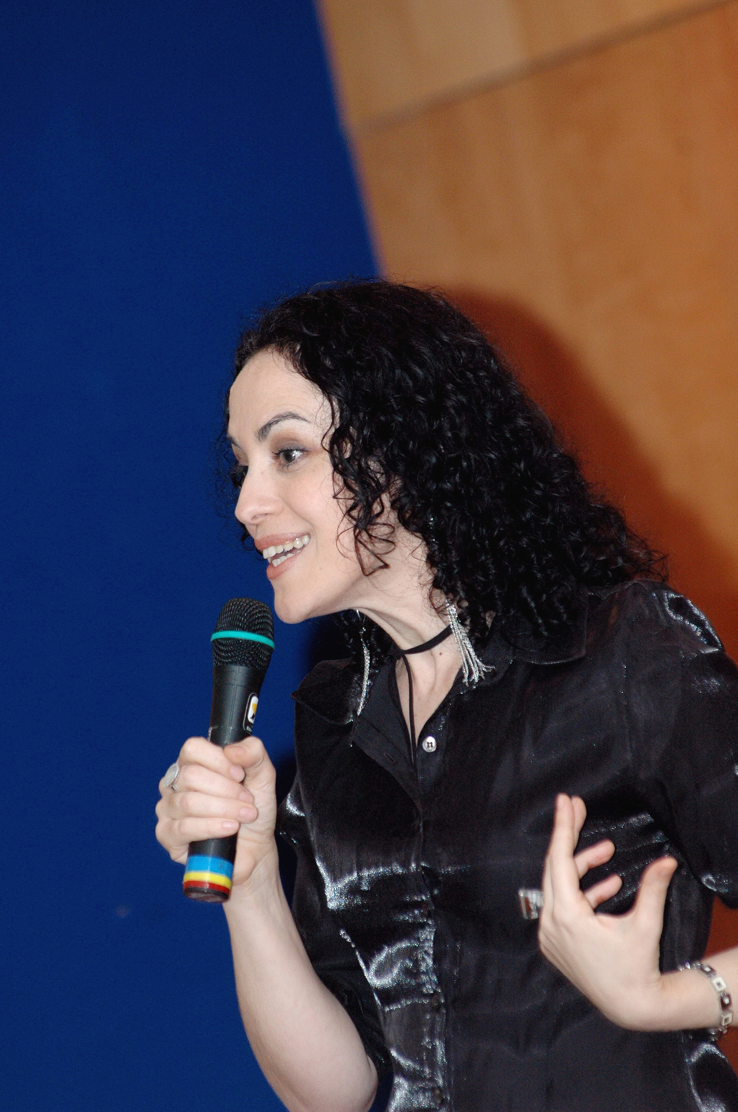 Cpfl cultura, cafÉ FilosÓFico.